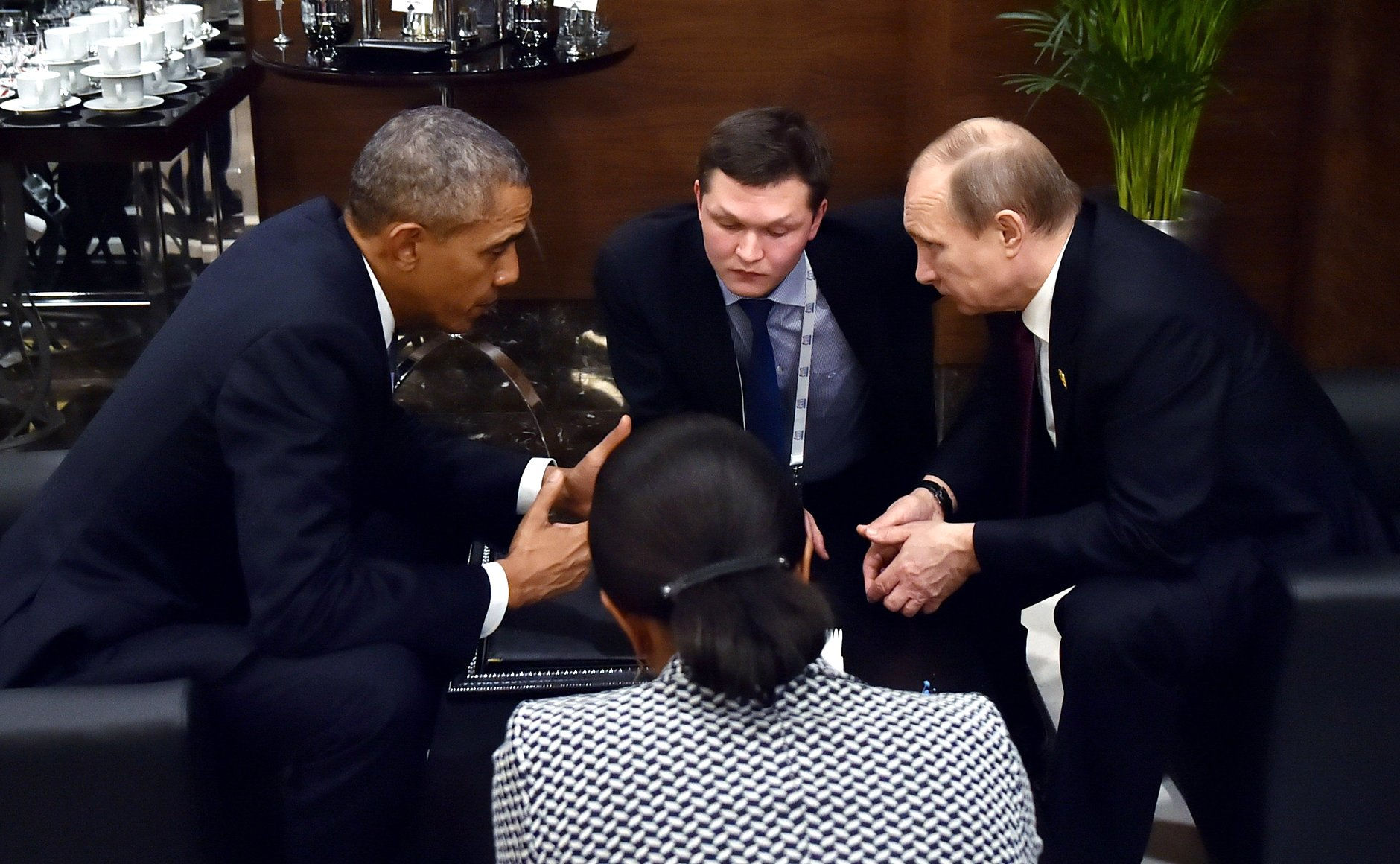 Краткая встреча Президента России Владимира Путина с Президентом США Бараком Обамой на полях саммита «Группы двадцати»